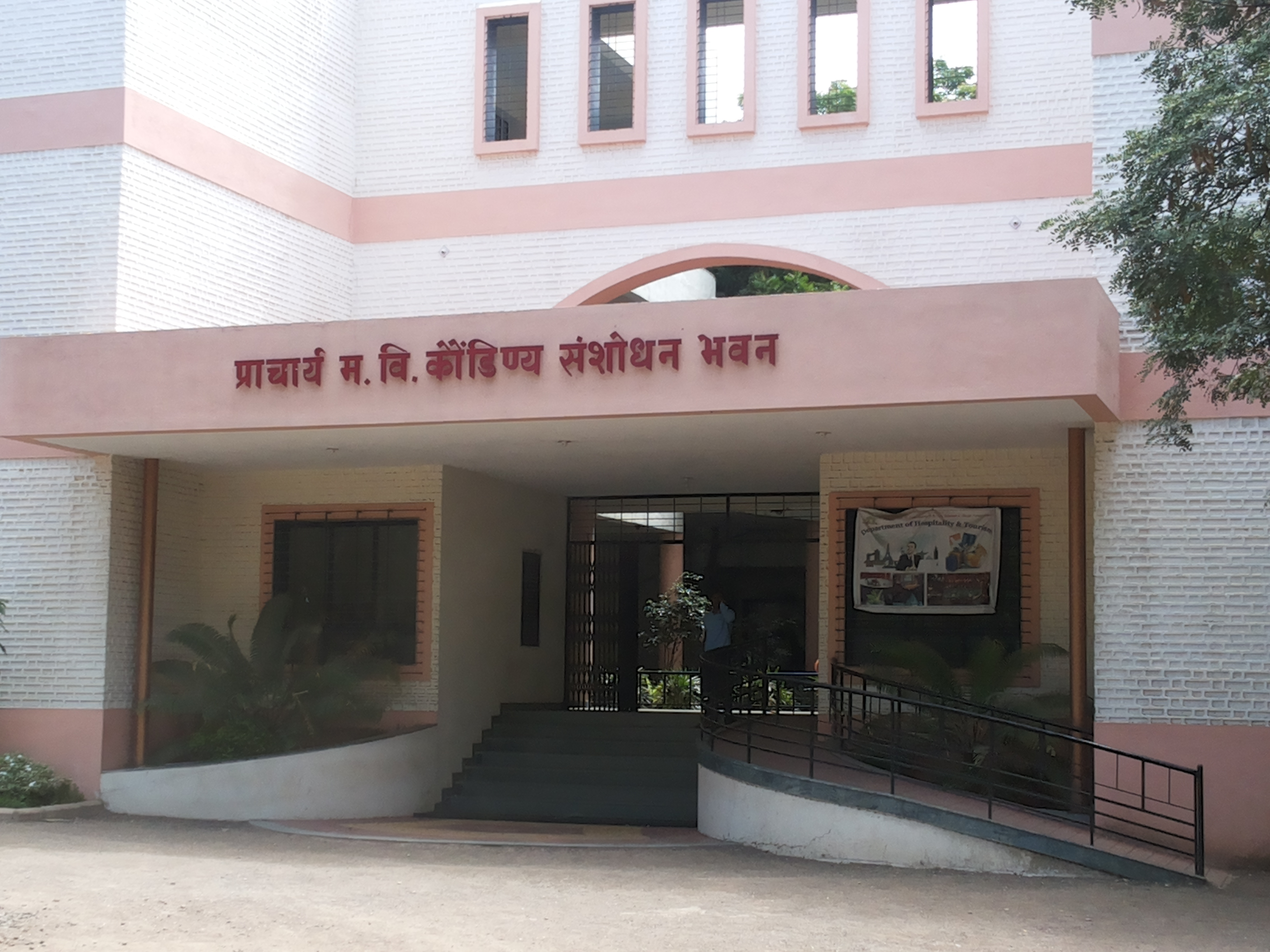 प्रिन्सीपल म. वि. कौंडिण्य संशोधन भवन